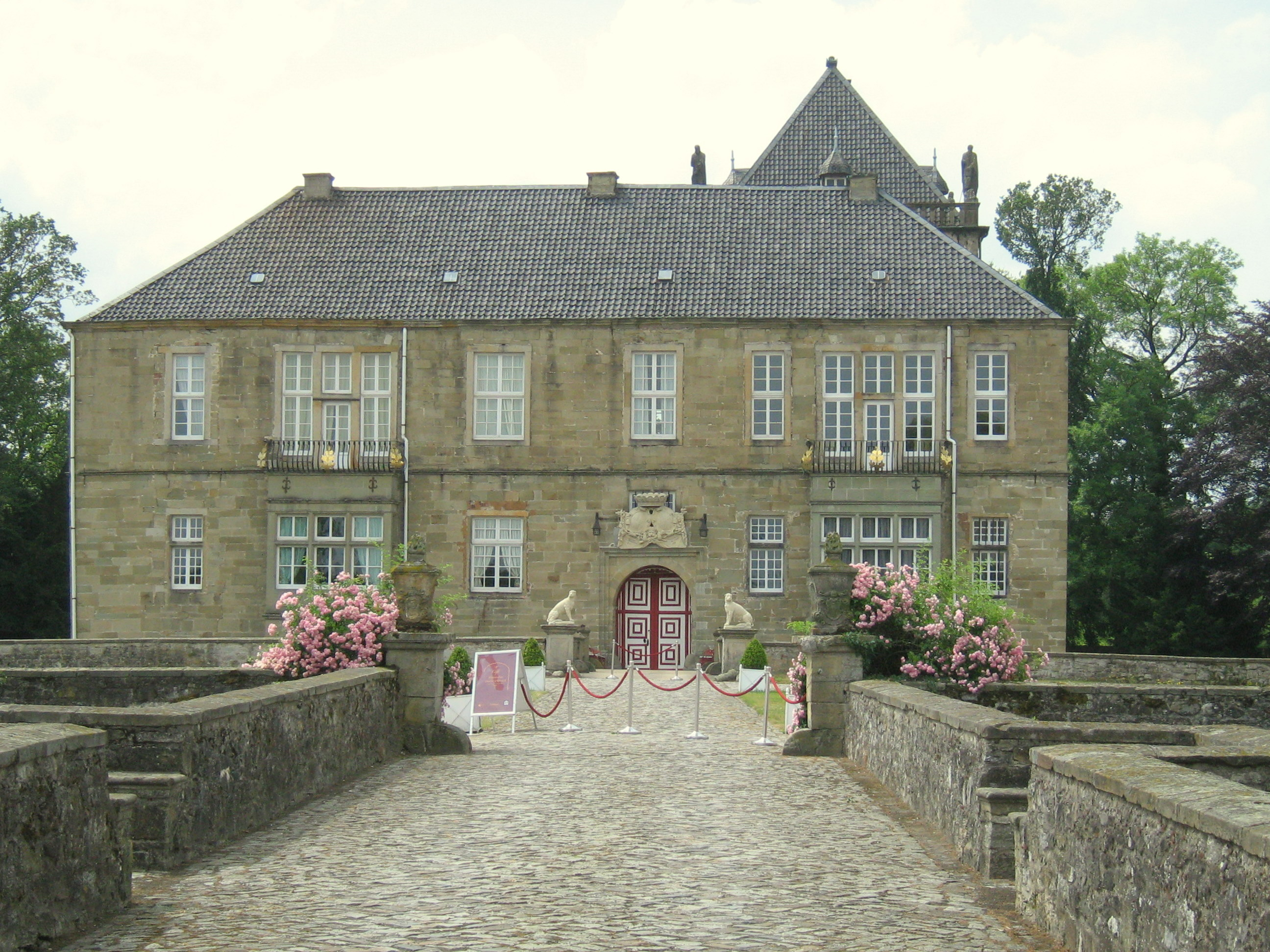 Schloss Gesmold bei Melle (Nähe Osnabrück)